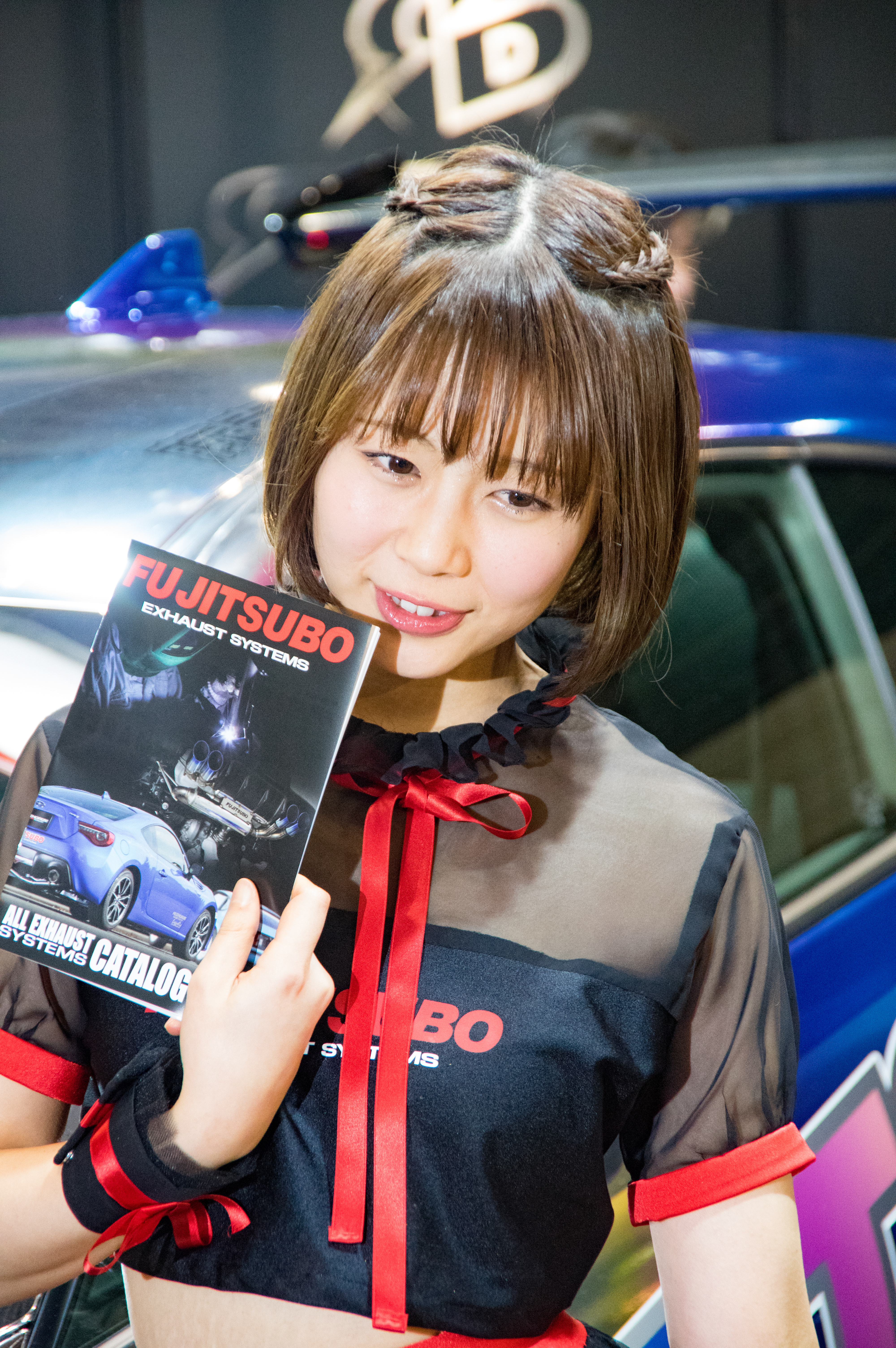 TOKYO AUTO SALON 2017 （東京オートサロン2017） 潮田ひかる